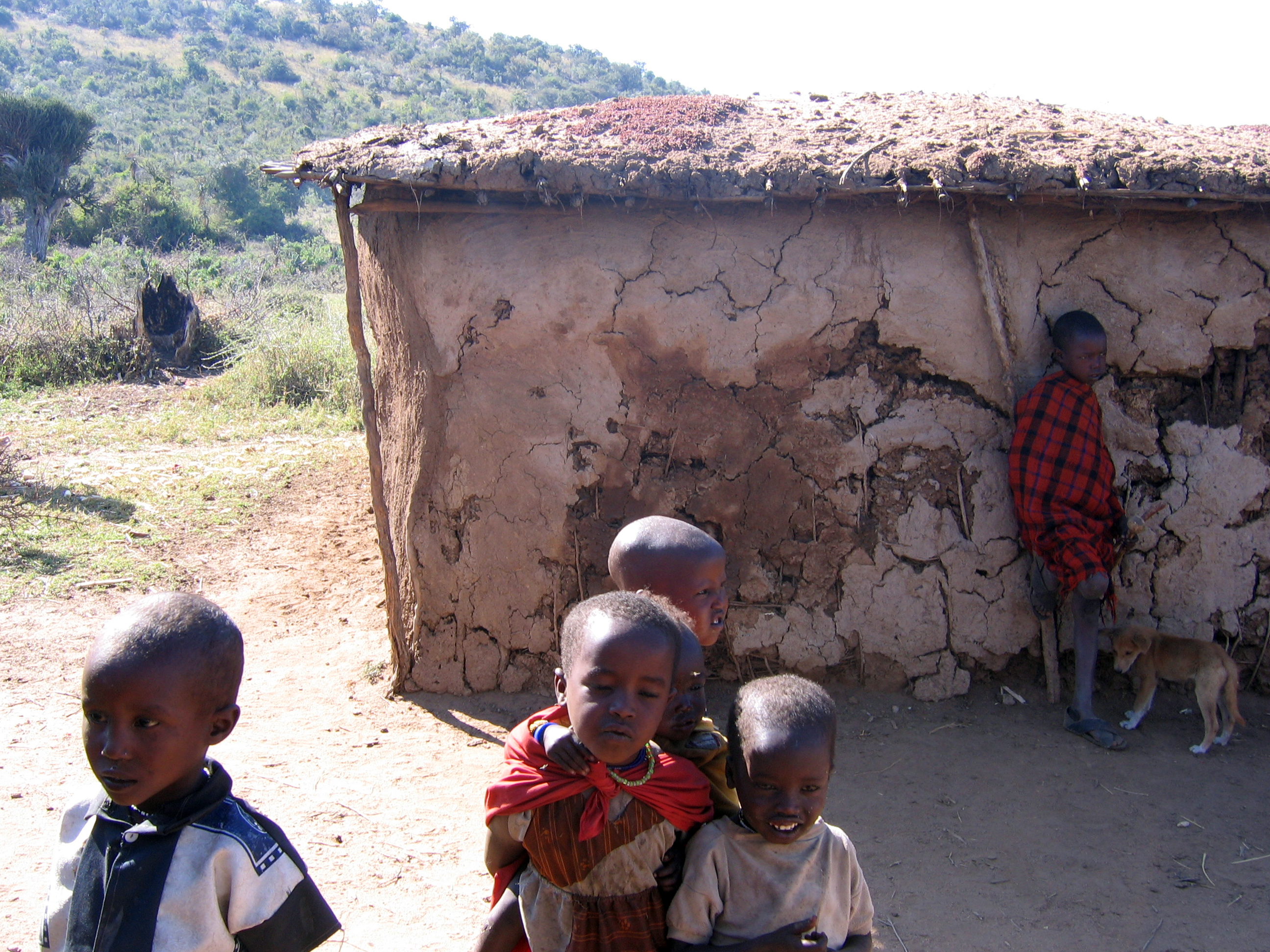 Children in a Maasai village, Kenya 2006.